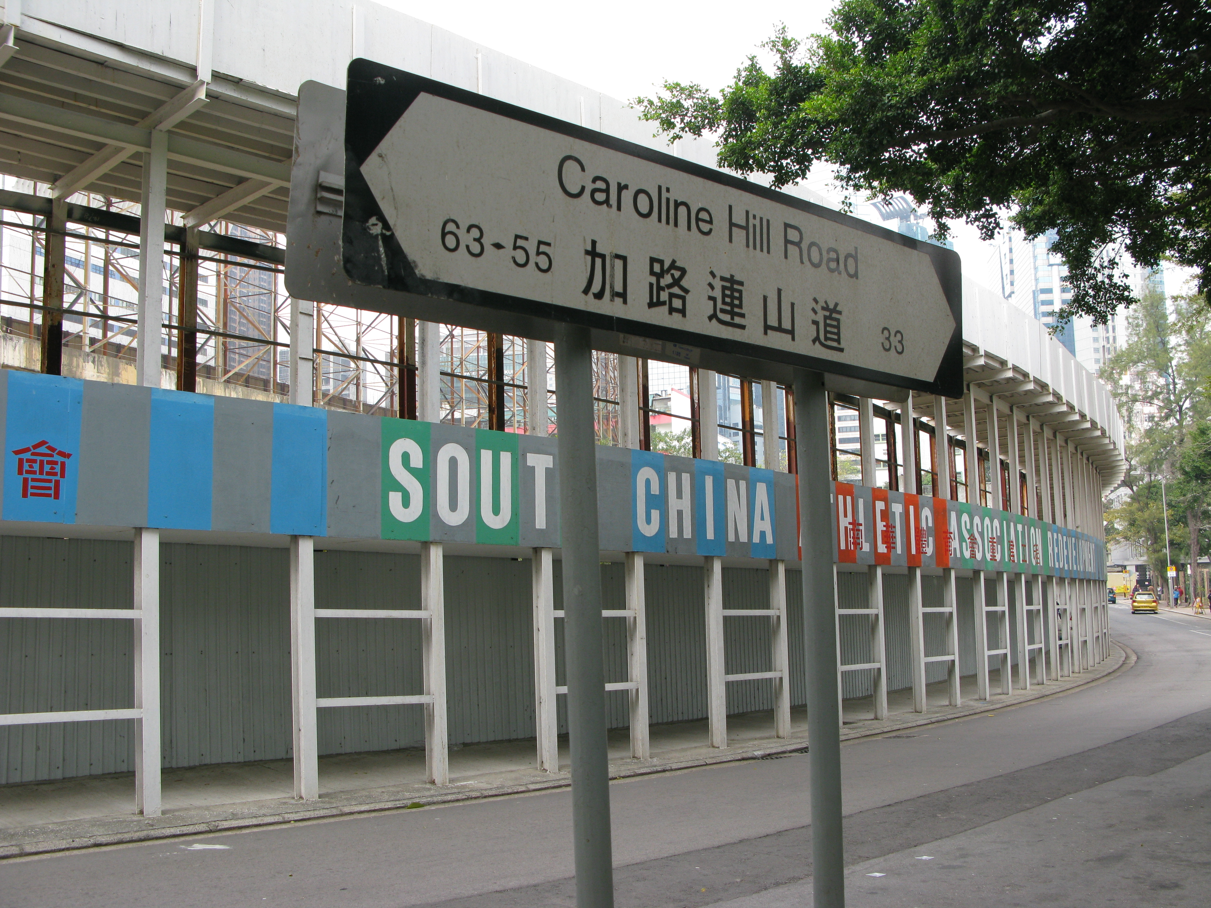 中文（香港）: 香港銅鑼灣加路連山道